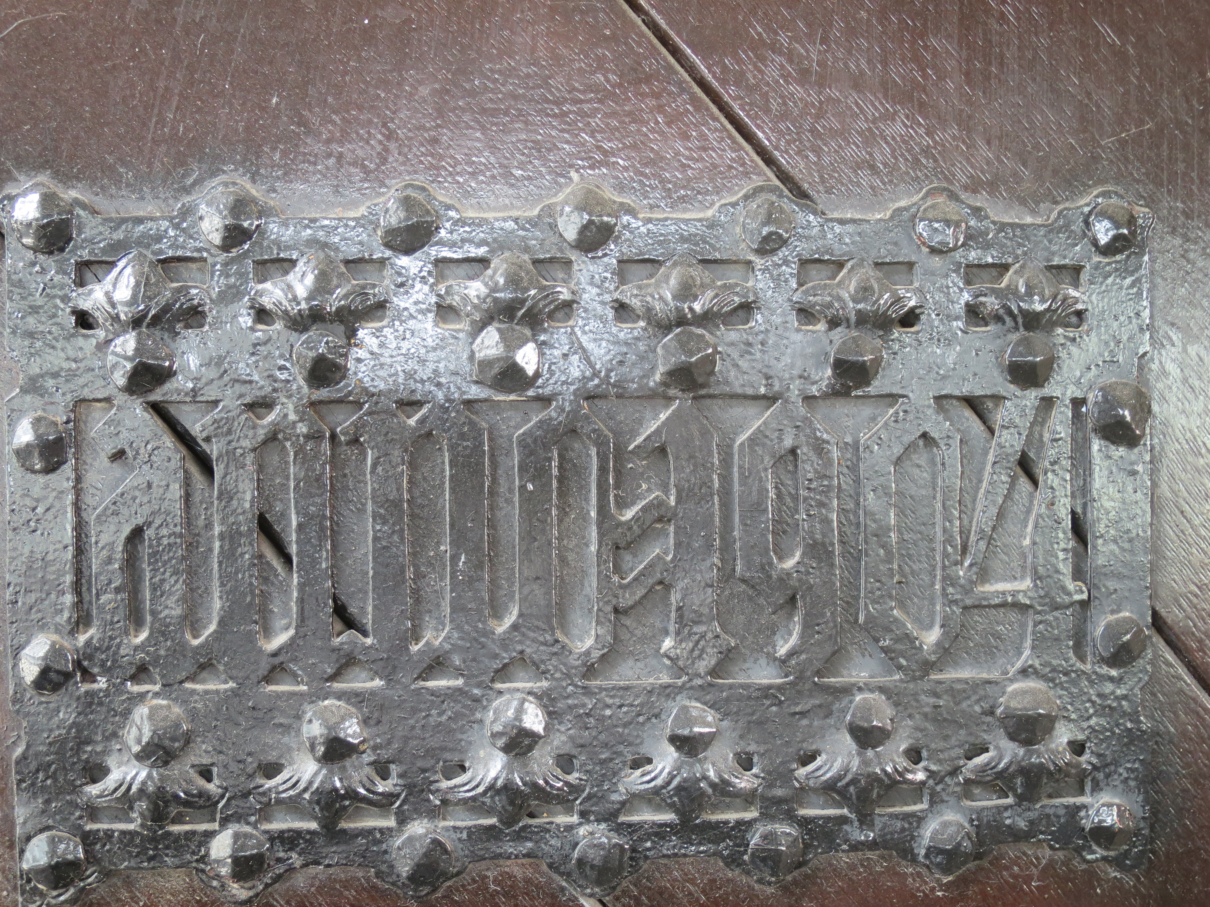 Worms Hauptbahnhof, Beschlag an der Tür der Nordseite